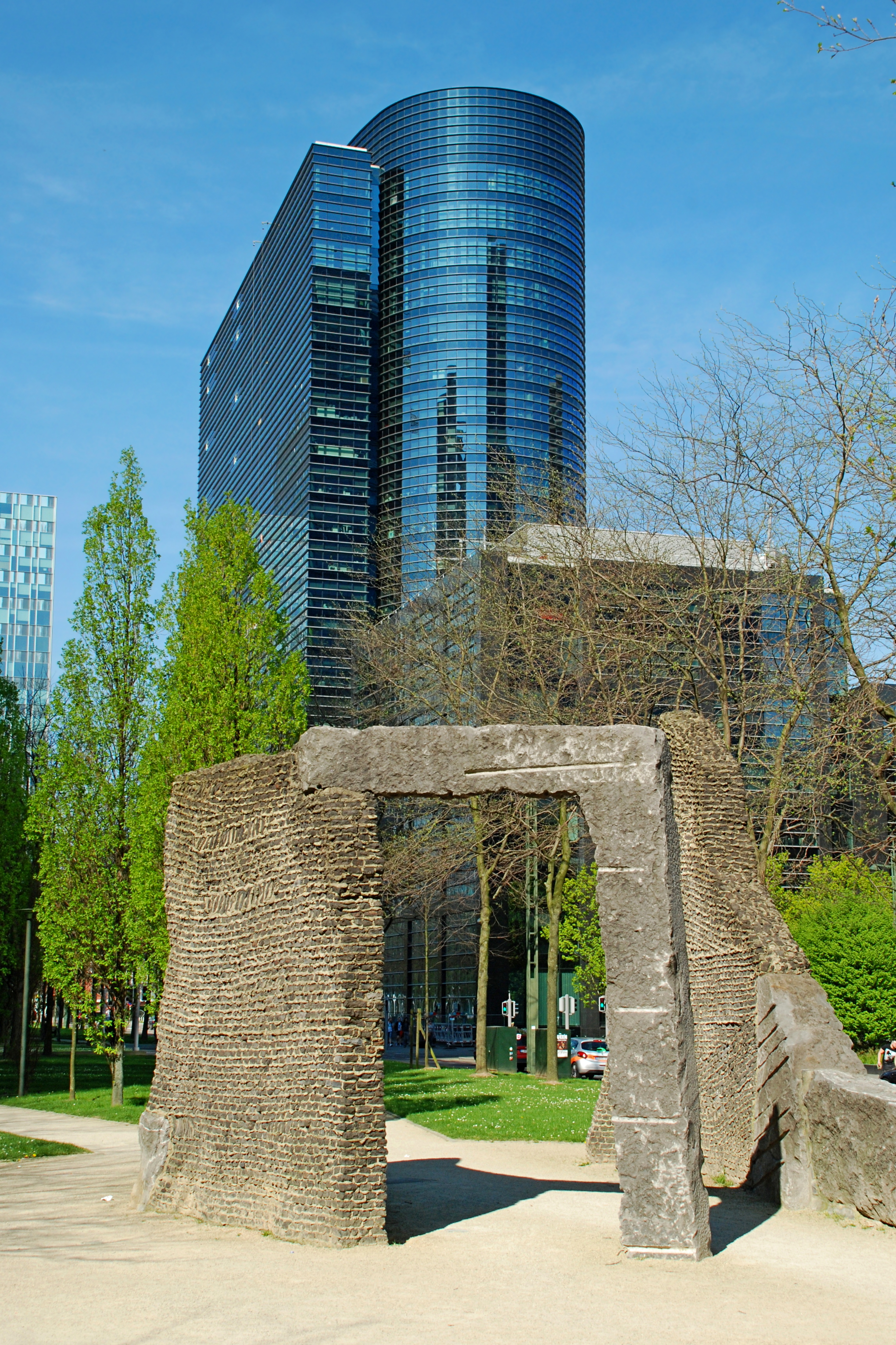 Belgique - Bruxelles - Ellipse building (postmodernisme - Bureau d'architecture Henri Montois - 2004-2007)